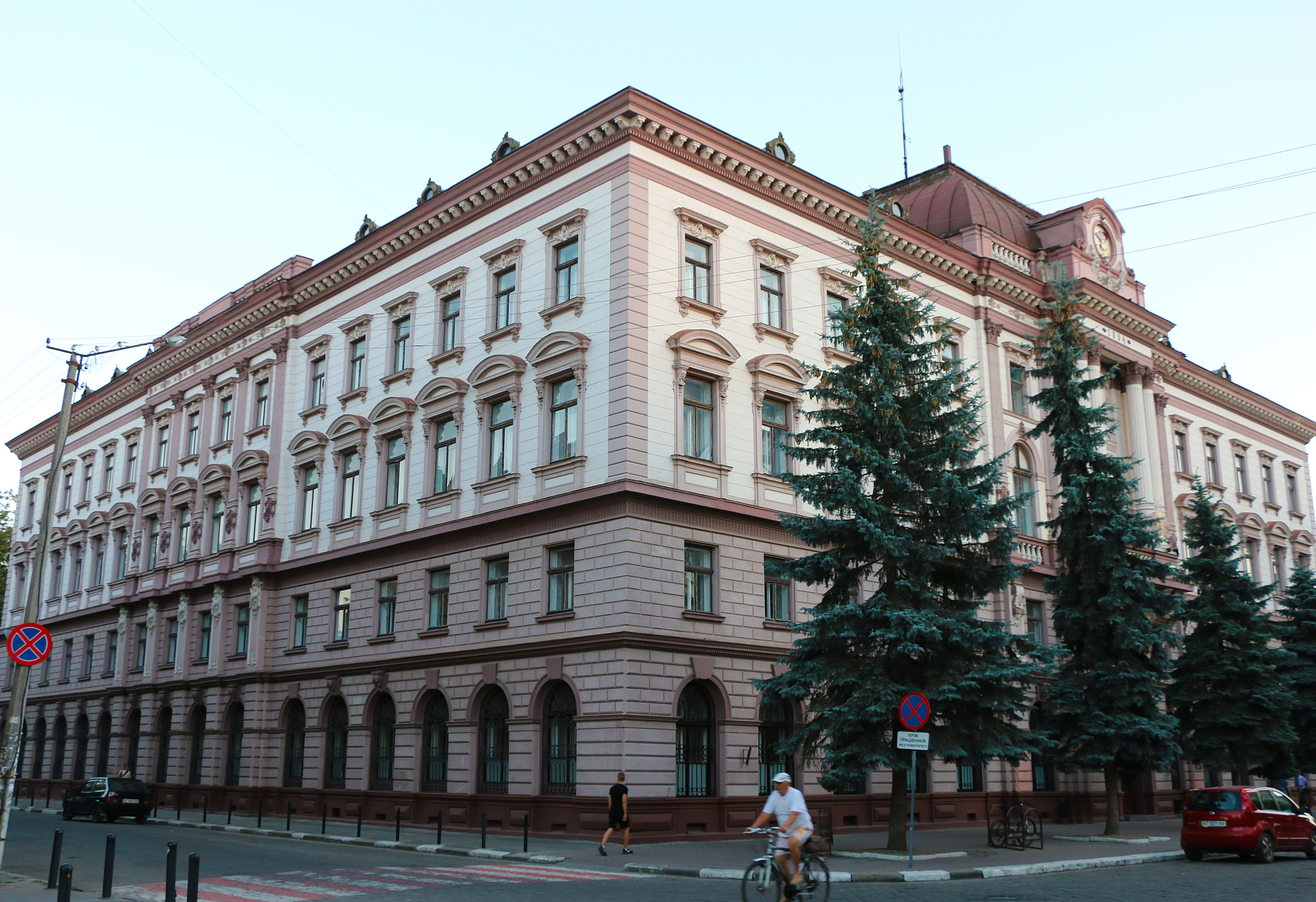 Австрійська дирекція залізниці, пізніше польський магістрат (мур.), Івано-Франківськ, вул. Галицька, 2